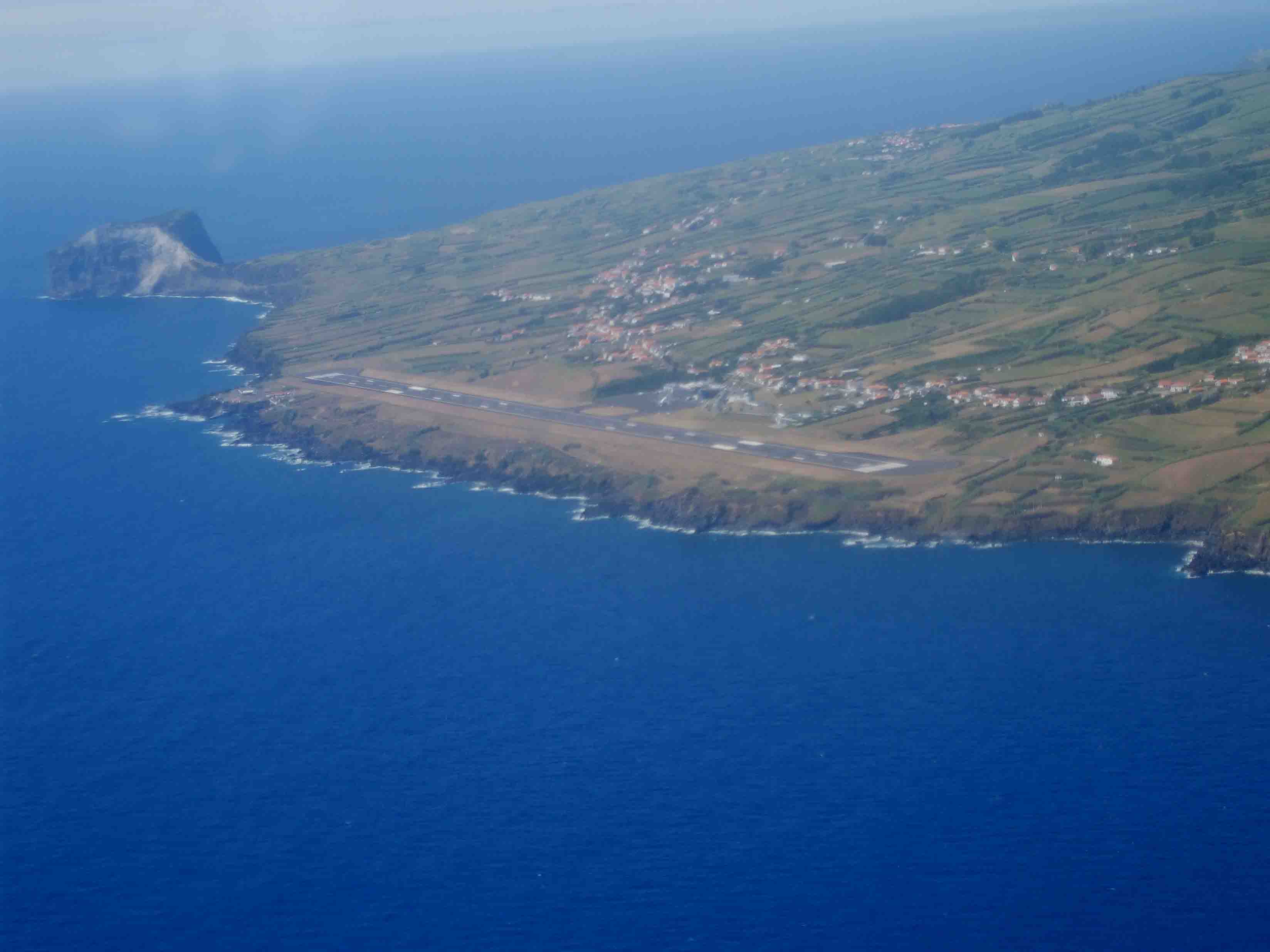 Aeroporto da Horta, ilha do Faial, Açores, Portugal